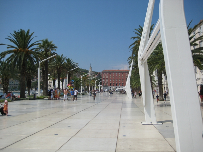 Splitska riva, Split, Croatia